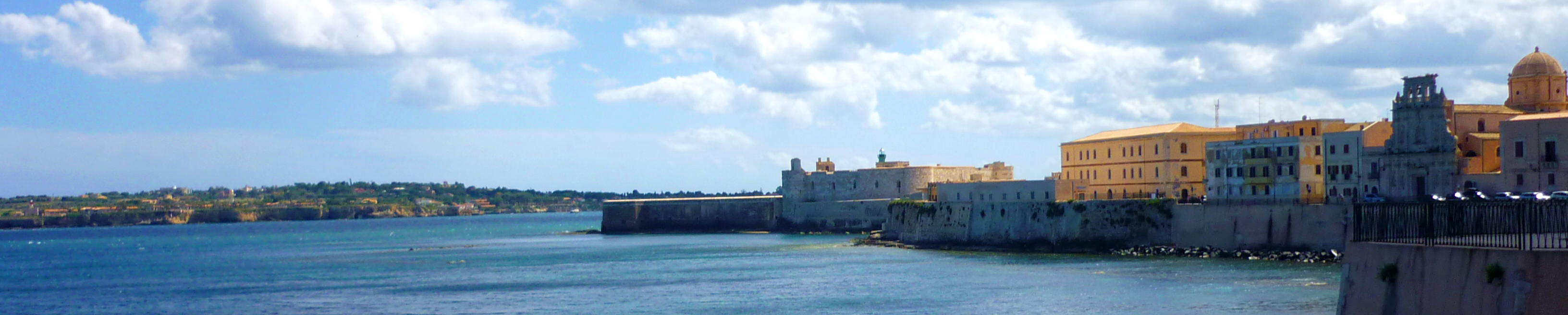 Veduta dal lato di Levante dell'isola di Ortigia e della penisola del Plemmirio. Autore originale dell'immagine Jesús Cabrera (3 maggio 2014)